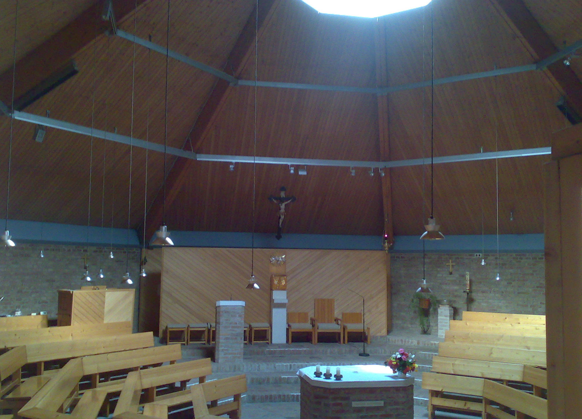 Kath. Filialkirche hl. Josef der Arbeiter. Von Architekt Roland Rainer, 1983 in der Siedlung Dirnelwiese in der Gemeinde Langenzersdorf errichtet, als oktogonaler Zentralbau, der sowohl der byzantinischen Tradition der frühen Kirche folgt, wie auch den Ideen des 2. Vatikanums. Der Altar und das Heilsgeschehen stehen im Zentrum. Zeltartiges Dach, mit einer einfachen Laterne im Mittelpunkt (Belichtungskonzept analog dem Pantheon in Rom). Sowohl die Kirche selbst, wie auch der Altar wurden mit den einfachsten Mitteln, wie es einer materiell armen Gemeinde von Siedlern am Rand einer Großstadt entsprochen hat, aus den Abbruchziegeln alter Häuser errichtet. Geschaffen wurde ein Kirchenraum von überwältigender Klarheit und Schlichtheit, der in seiner Geisteshaltung aber auch an die japanische Baukunst in der Tradition des Zen denken lässt.